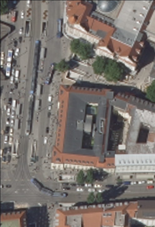 München Bahnhofsplatz 1